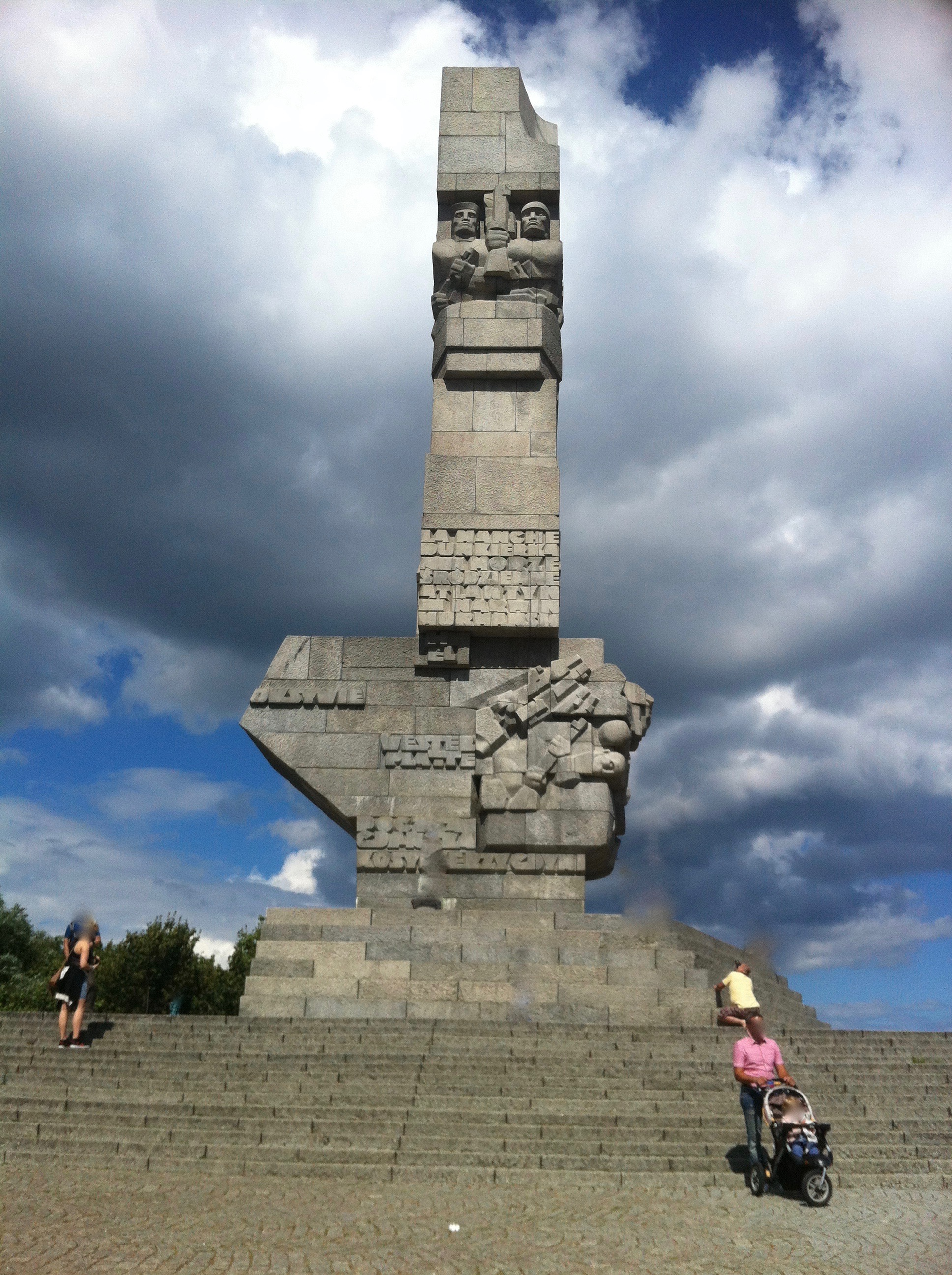 Westerplatte